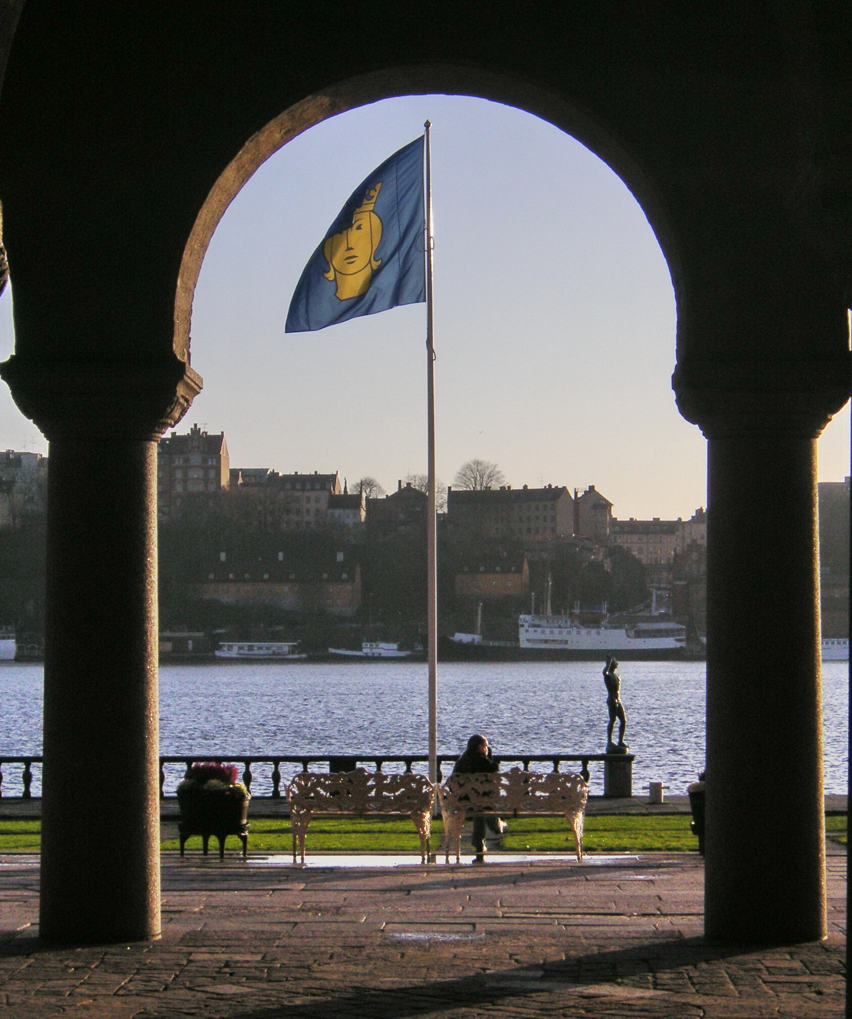 Stockholms stadshus, vy genom arkadgången mot Riddarfjärden